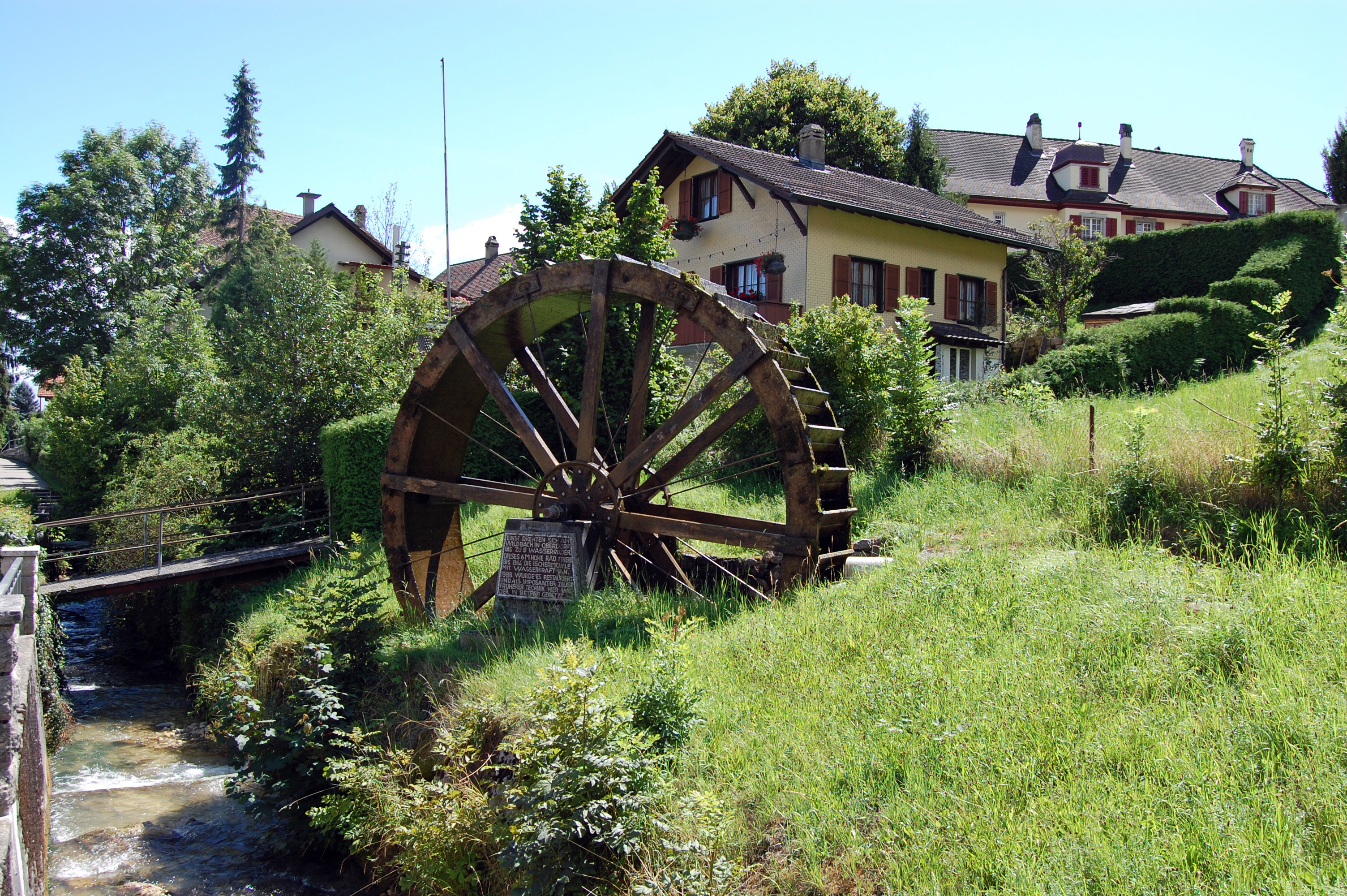 Ein Wasserrad in Oberdorf SO. Auf der Tafel steht: "Einst drehten sich am Wildbach in Oberdorf bis zu 9 Wasserräder. Dieses 6 m hohe Rad trieb bis 1966 die Ischermühle mit Wasserkraft an. 1988 wurde es restauriert und als imposanter Zeuge früherer Technik hier wieder in Betrieb gesetzt."